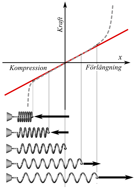 Hook's lag för en fjäder